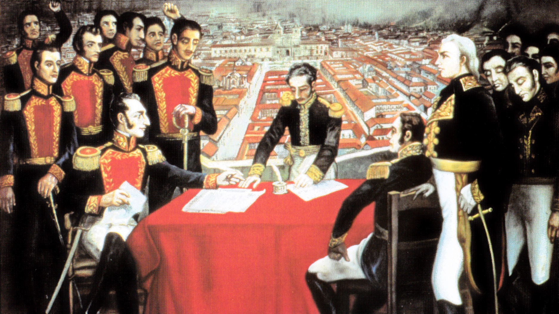 "Armisticio de la batalla de Pichincha" - Antonio Salas, año 1868. óleo sobre lienzo, Quito (Ecuador).